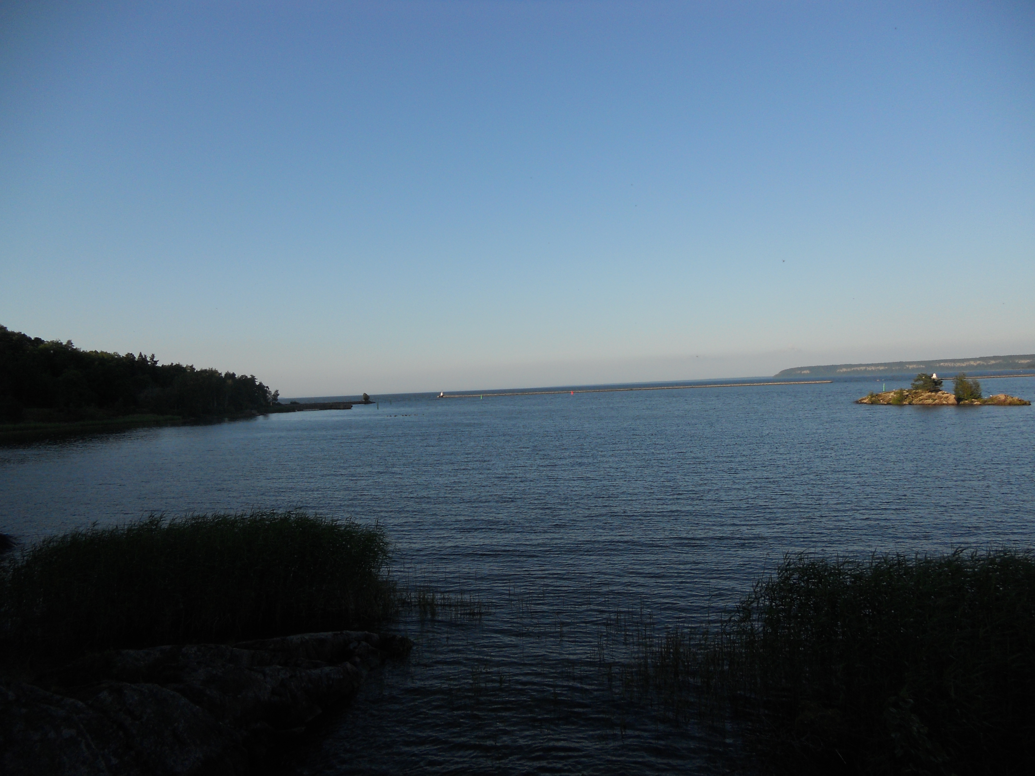 Vänern från Dalbokusten, liten vik vid Dalbostigen. Vänersborgs yttersta vågbrytare syns.